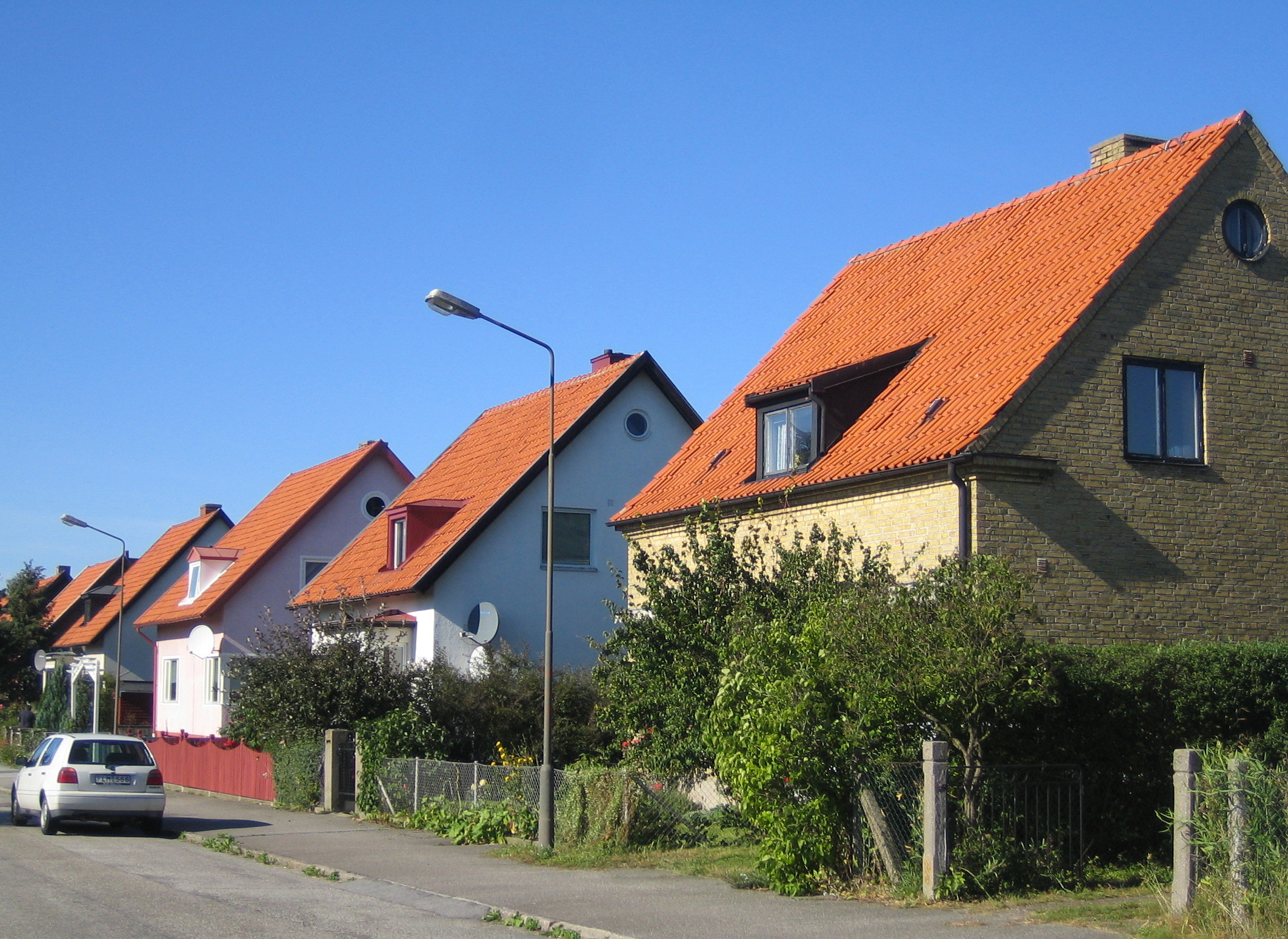 Västra Kattarp, Malmö, Sweden